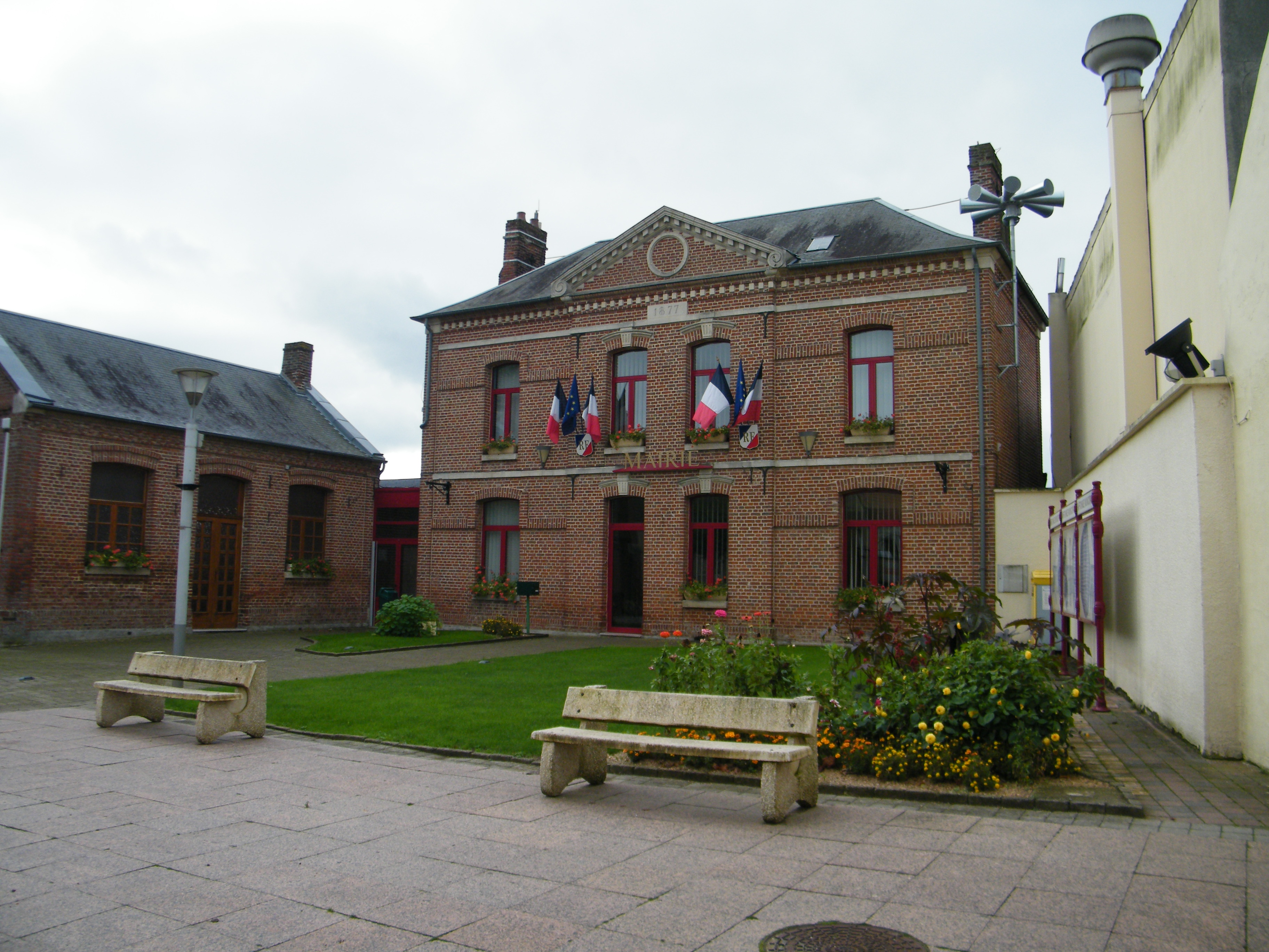 Mairie.